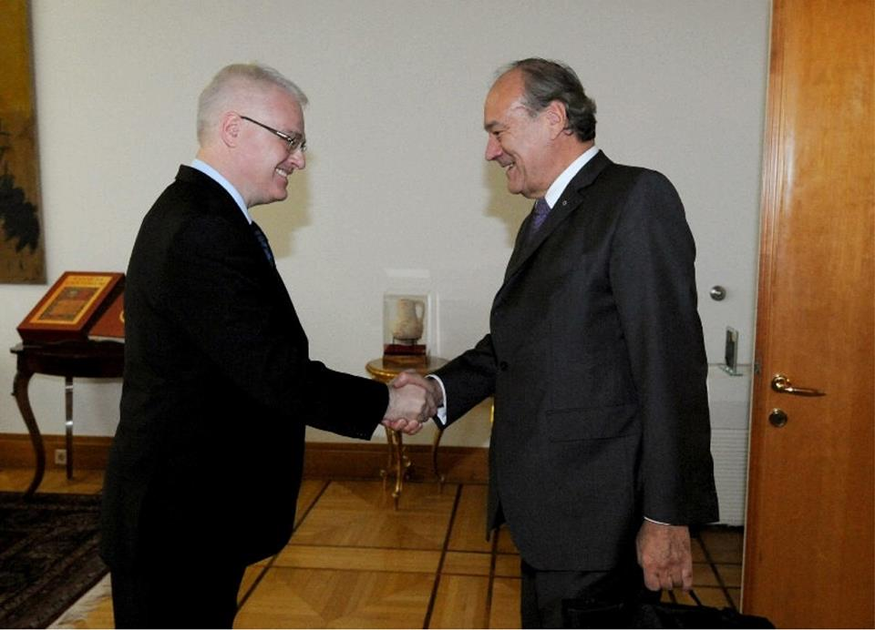 Ivo Josipović, predsjednik Republike Hrvatske i dr. Felix Unger, predsjednik Europske akademije znanosti i umjetnosti